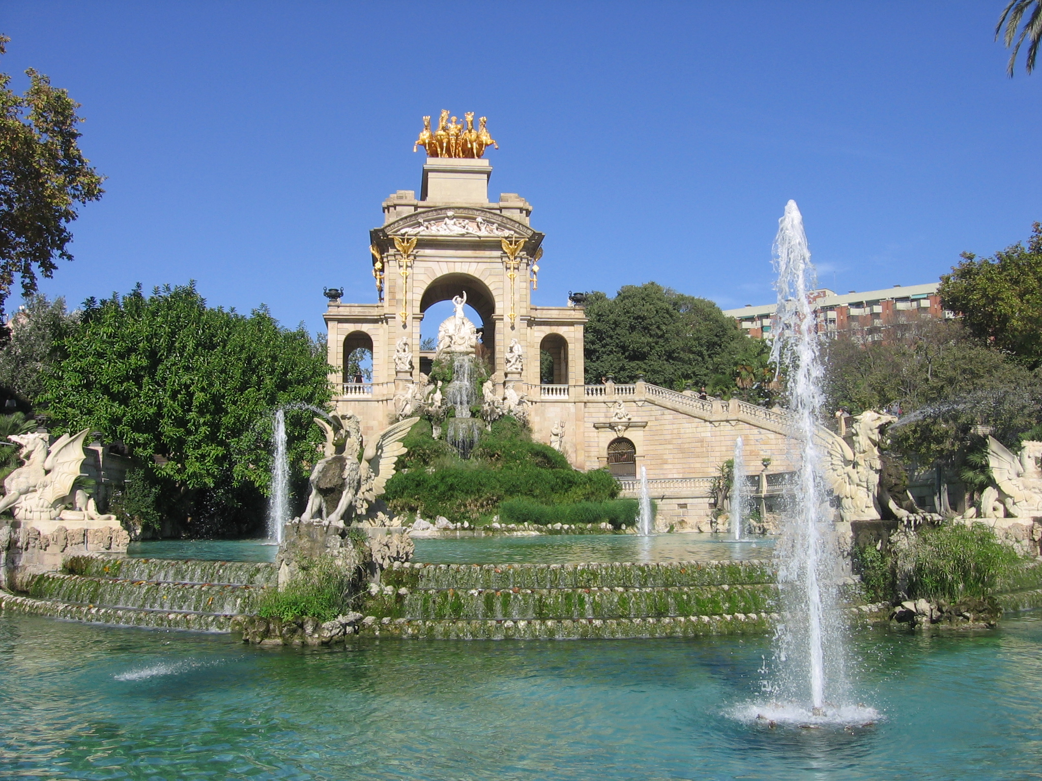 Cascada Monumental, Parque de la Ciutadella.